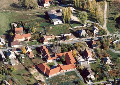 Panoramo de Alsóörs.